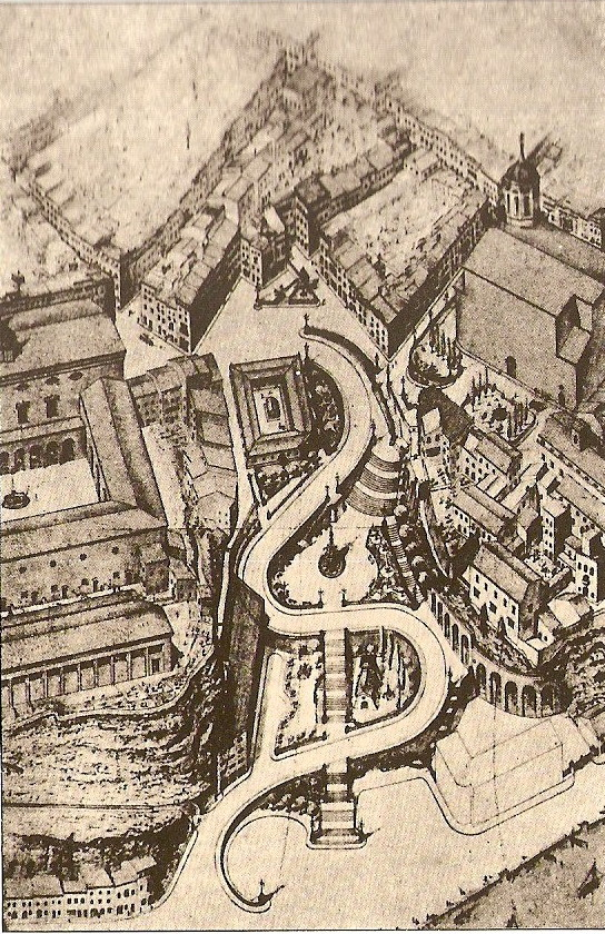 Dibuix Claret